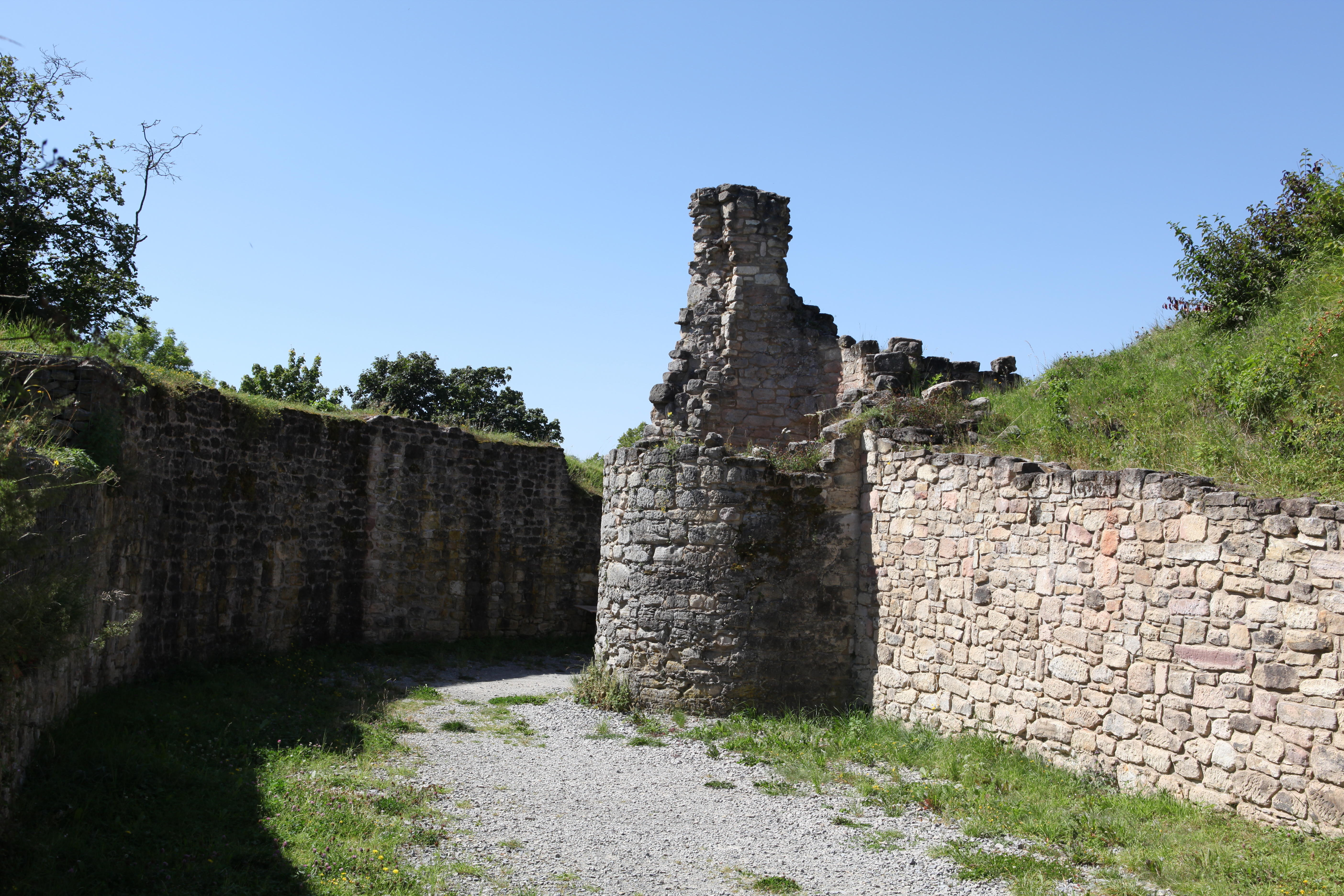 Burg Schaumberg in Schalkau